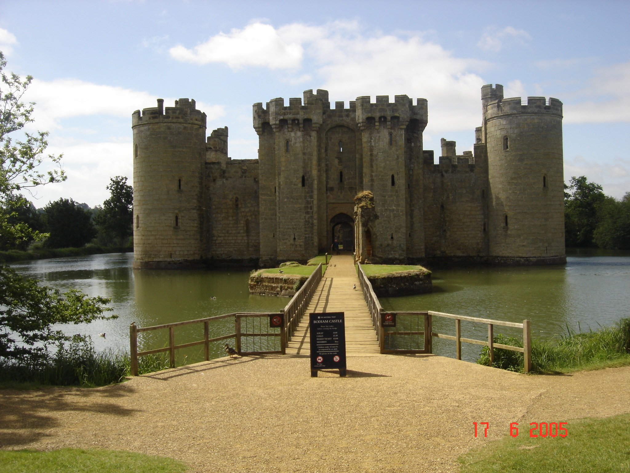 Bodiam Castle, 17-06-2005, japiot